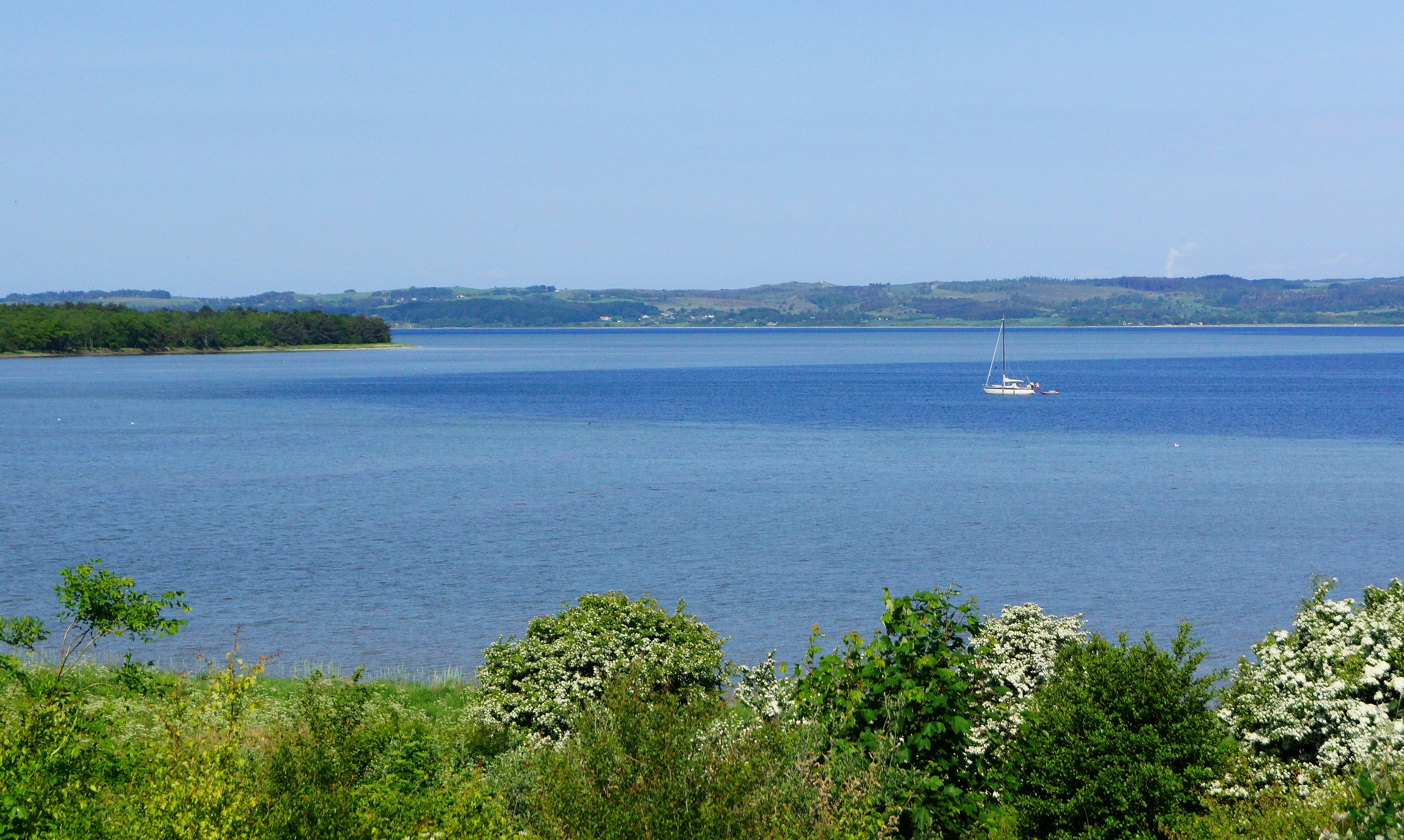 Ebeltoft Vig retning vest